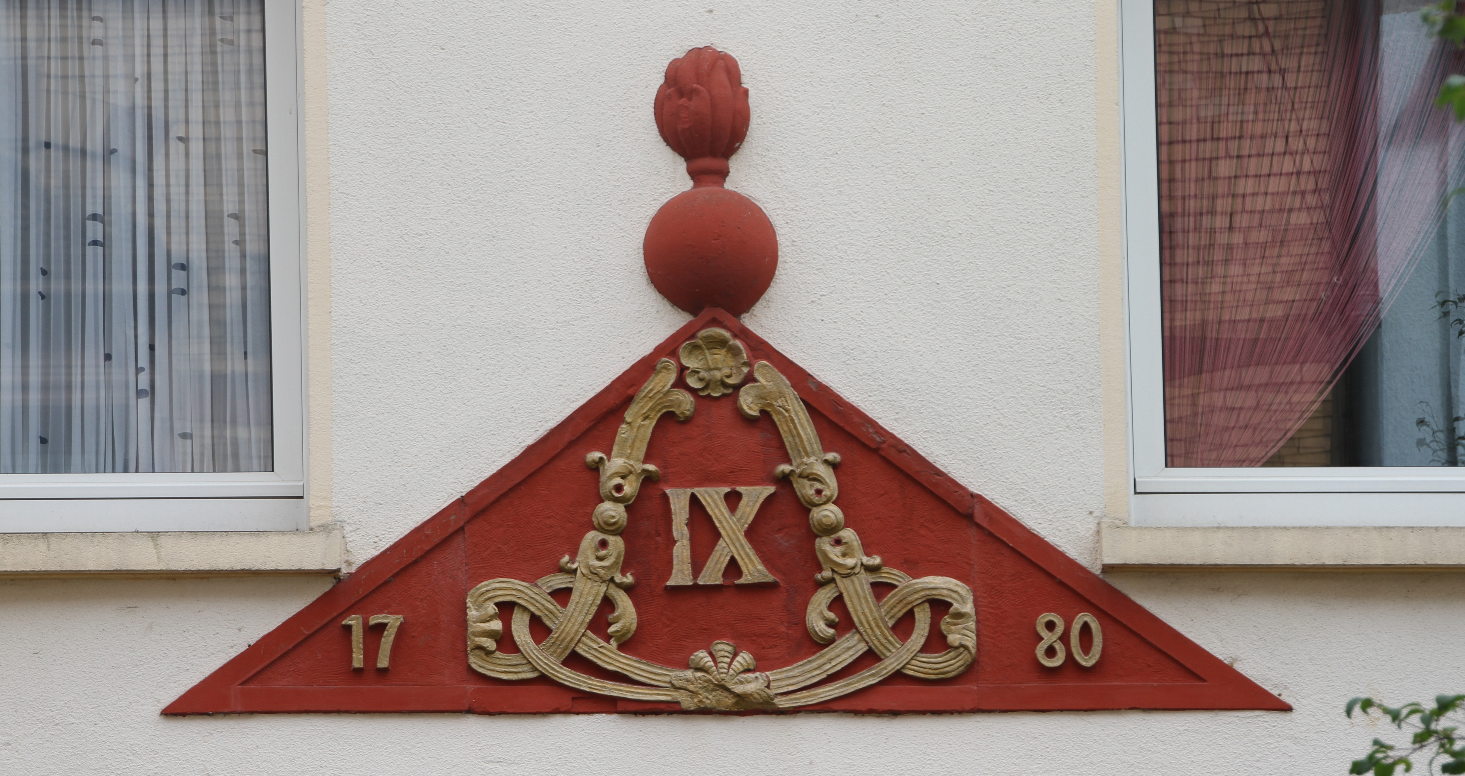 Pirmasens, Hauptstraße 102; Dreiecksgiebel des ehemaligen landgräflichen Offizierskasinos; Emblem Ludwigs IX., bezeichnet 1780.